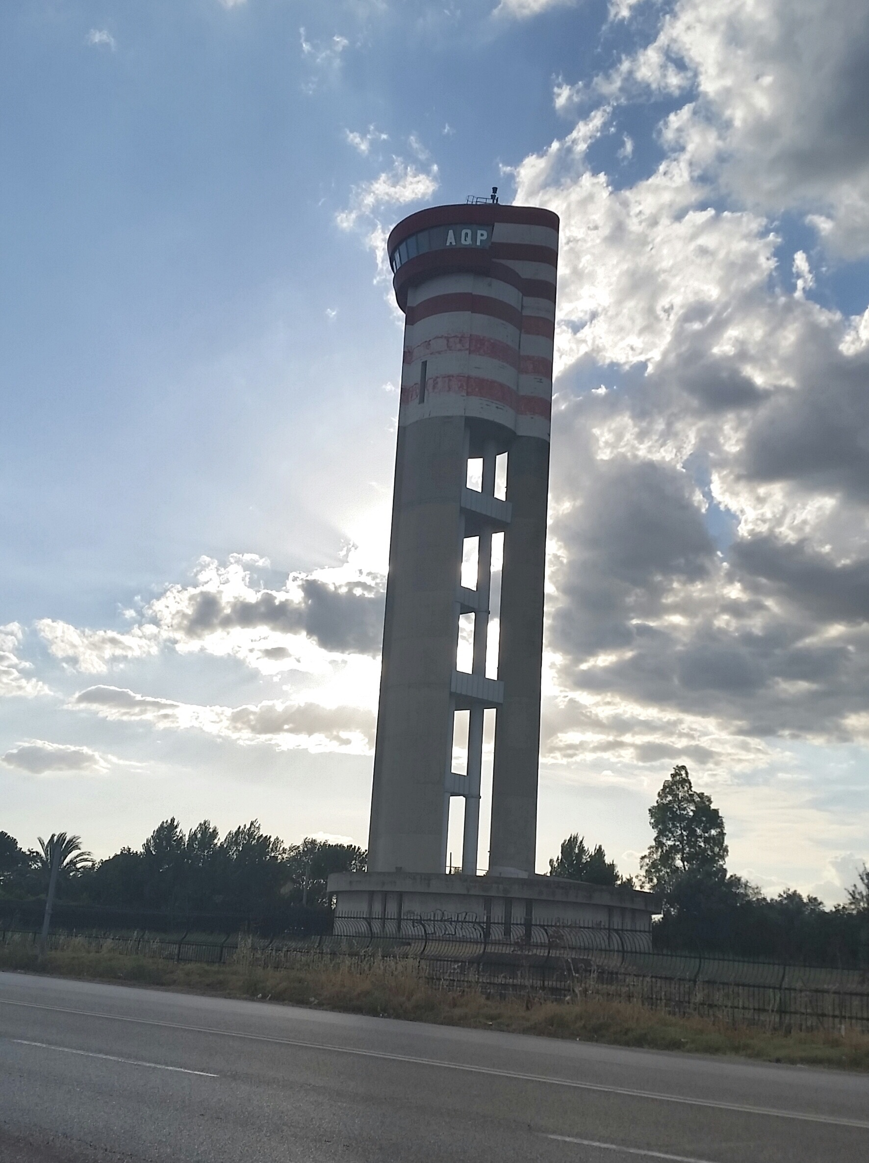 Serbatoio AQP nei pressi di Foggia